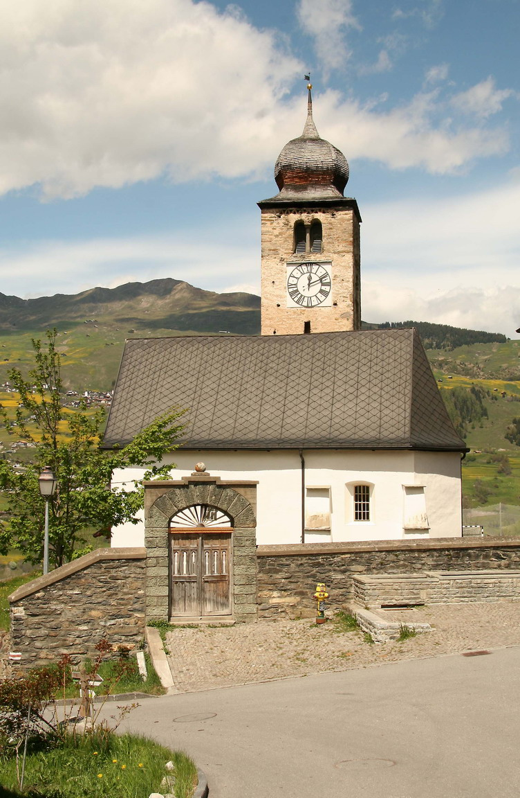 Kirche der Gemeinde Duvin / GR (Schweiz)